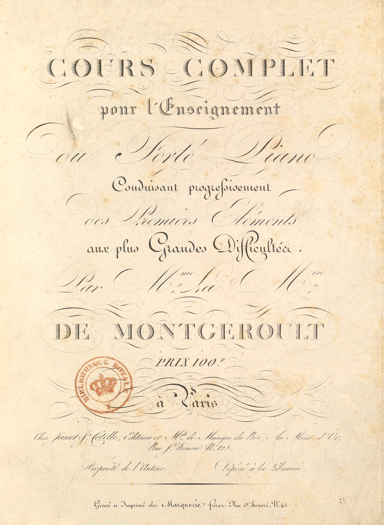 Page de titre du Cours complet pour l’enseignement du forte-piano d'Hélène de Montgeroult (1764–1836), publié vers 1816.